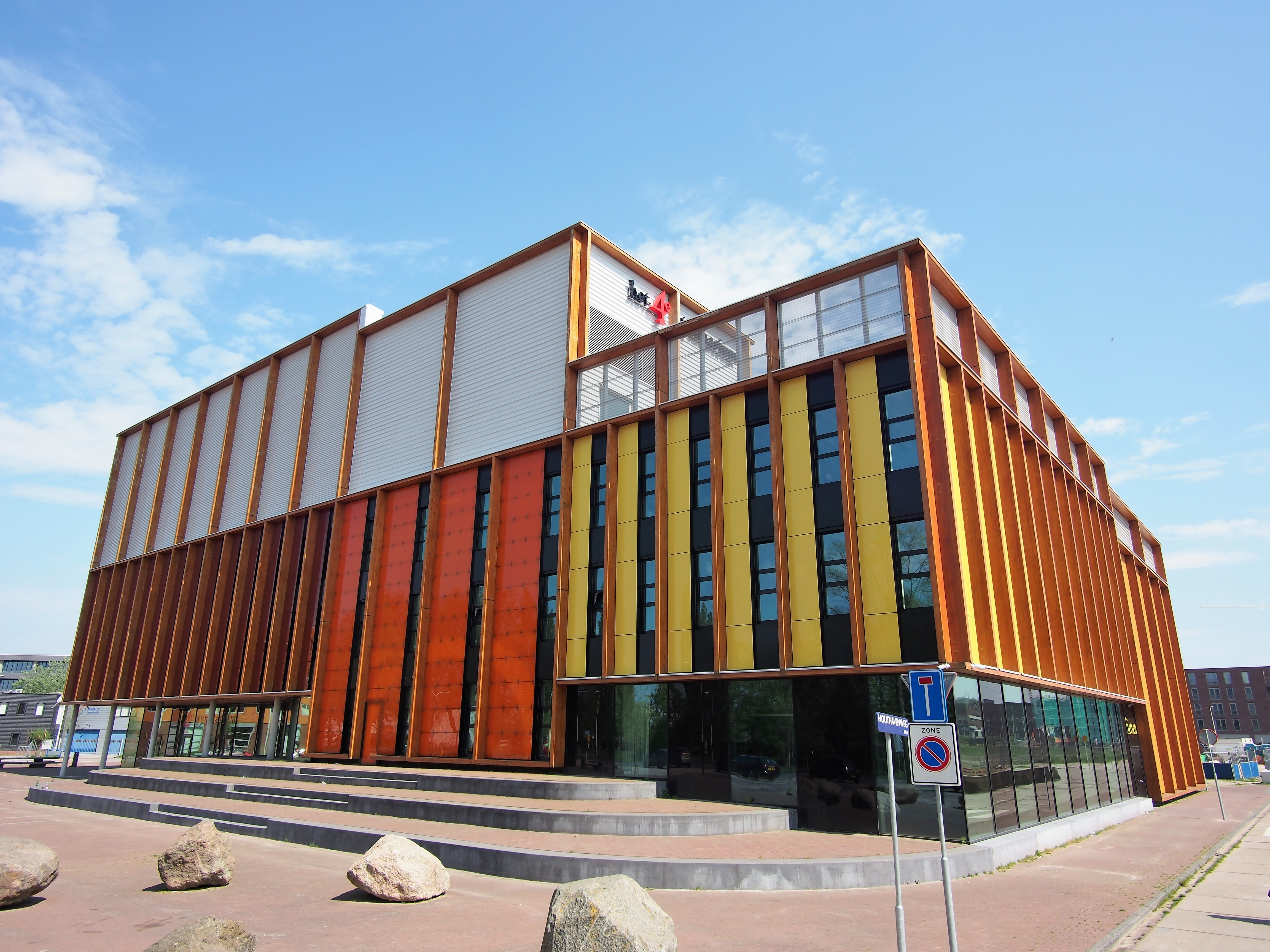 Het 4e Gymansium, Archangelweg, Amsterdam.